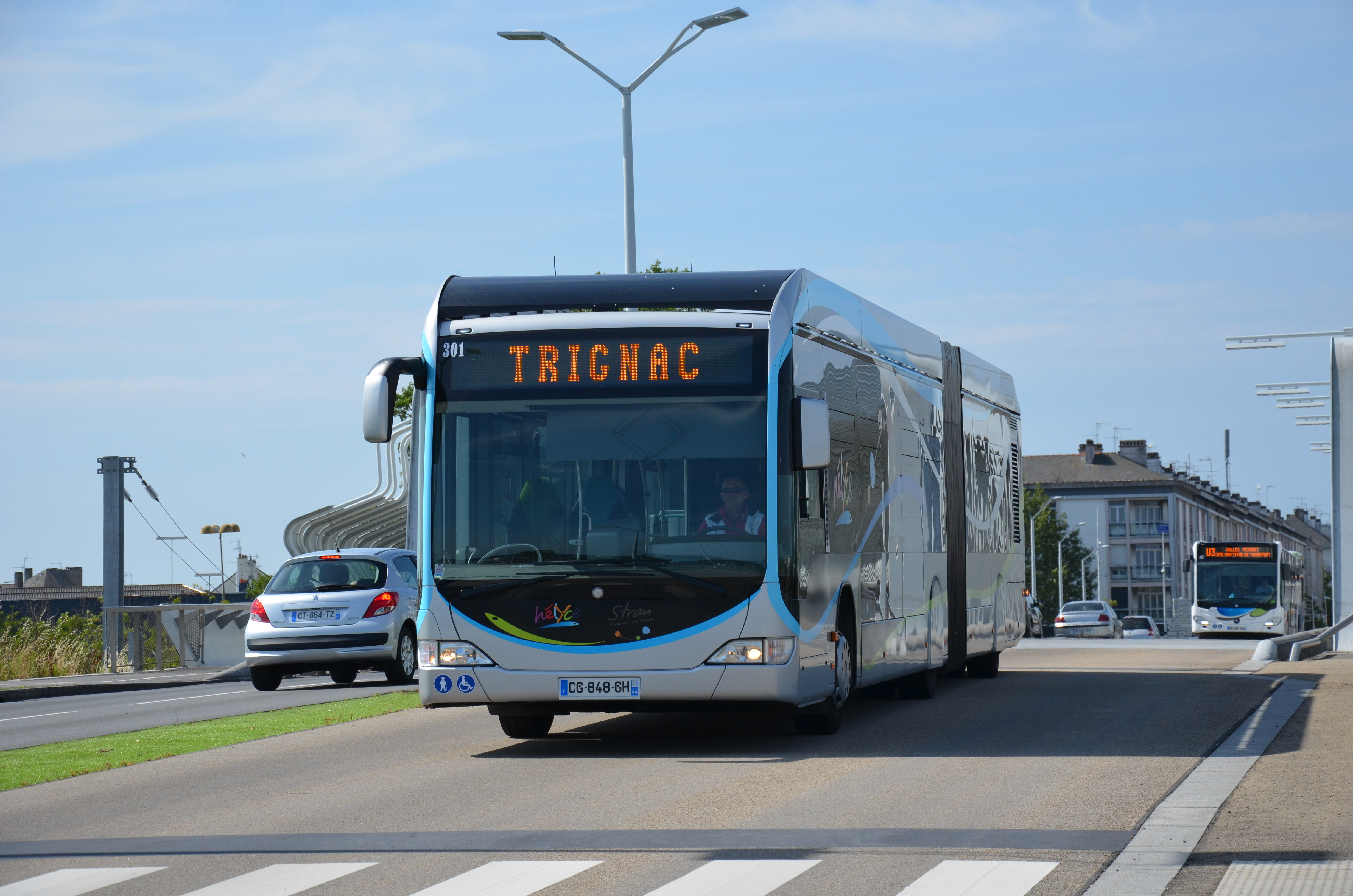 Mercedes Citaro G C1 FaceLift n°301 près de l'arrêt Herbins, sur la ligne HÉLYCE du réseau STRAN de Saint-Nazaire.